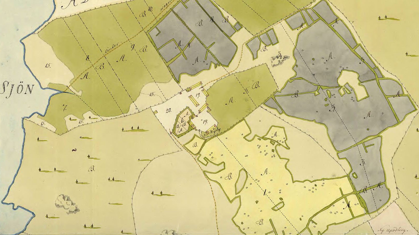 Del av karta över Hallstas ägor